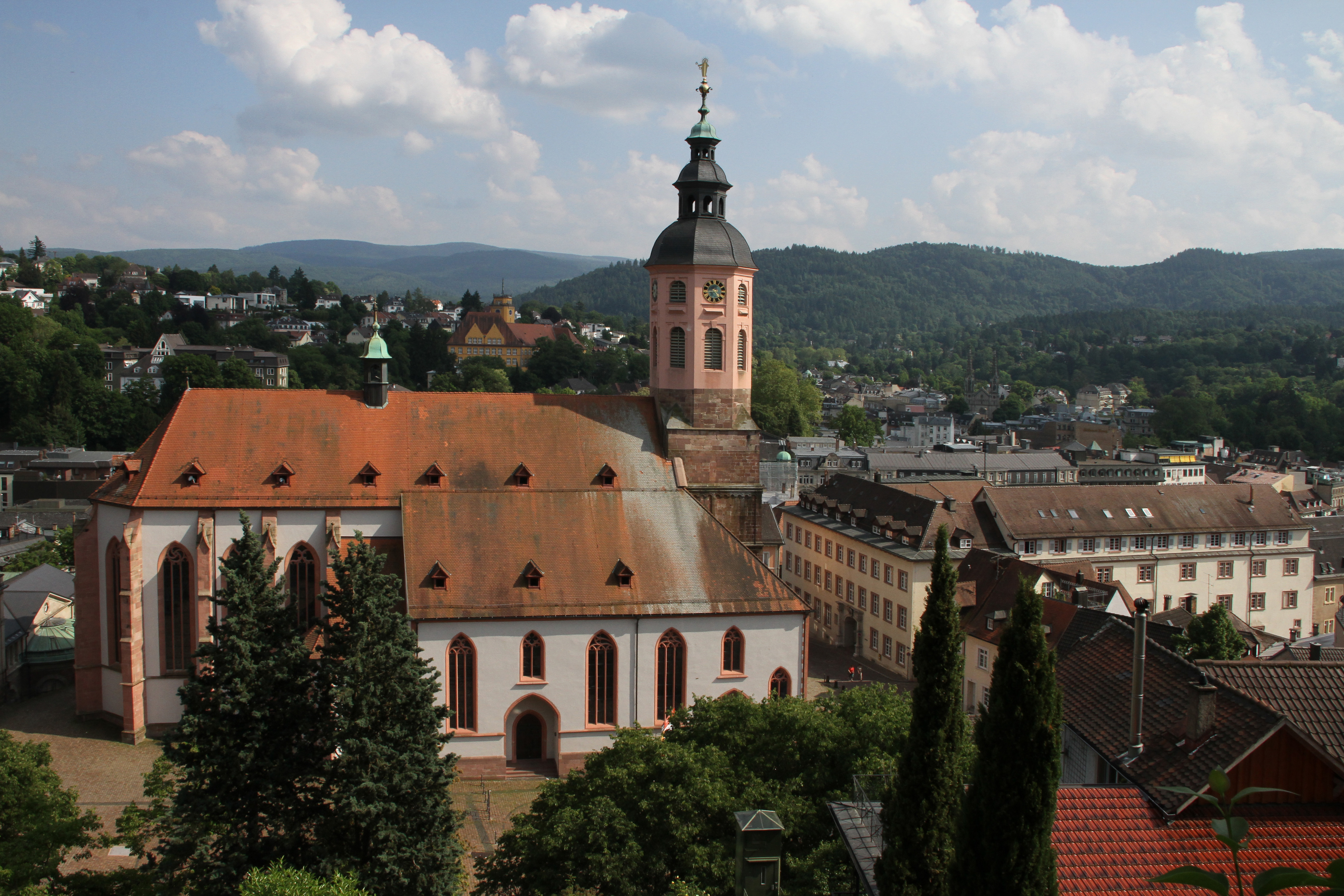 Stiftskirche Baden-Baden